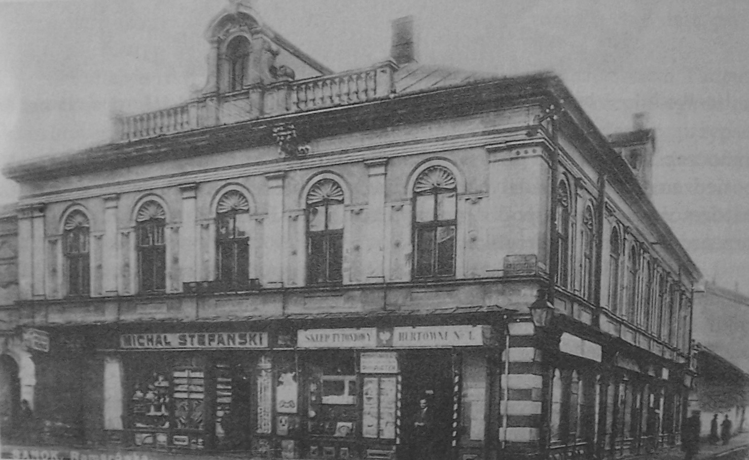 Kamienica Ramerówka (przed 1939)